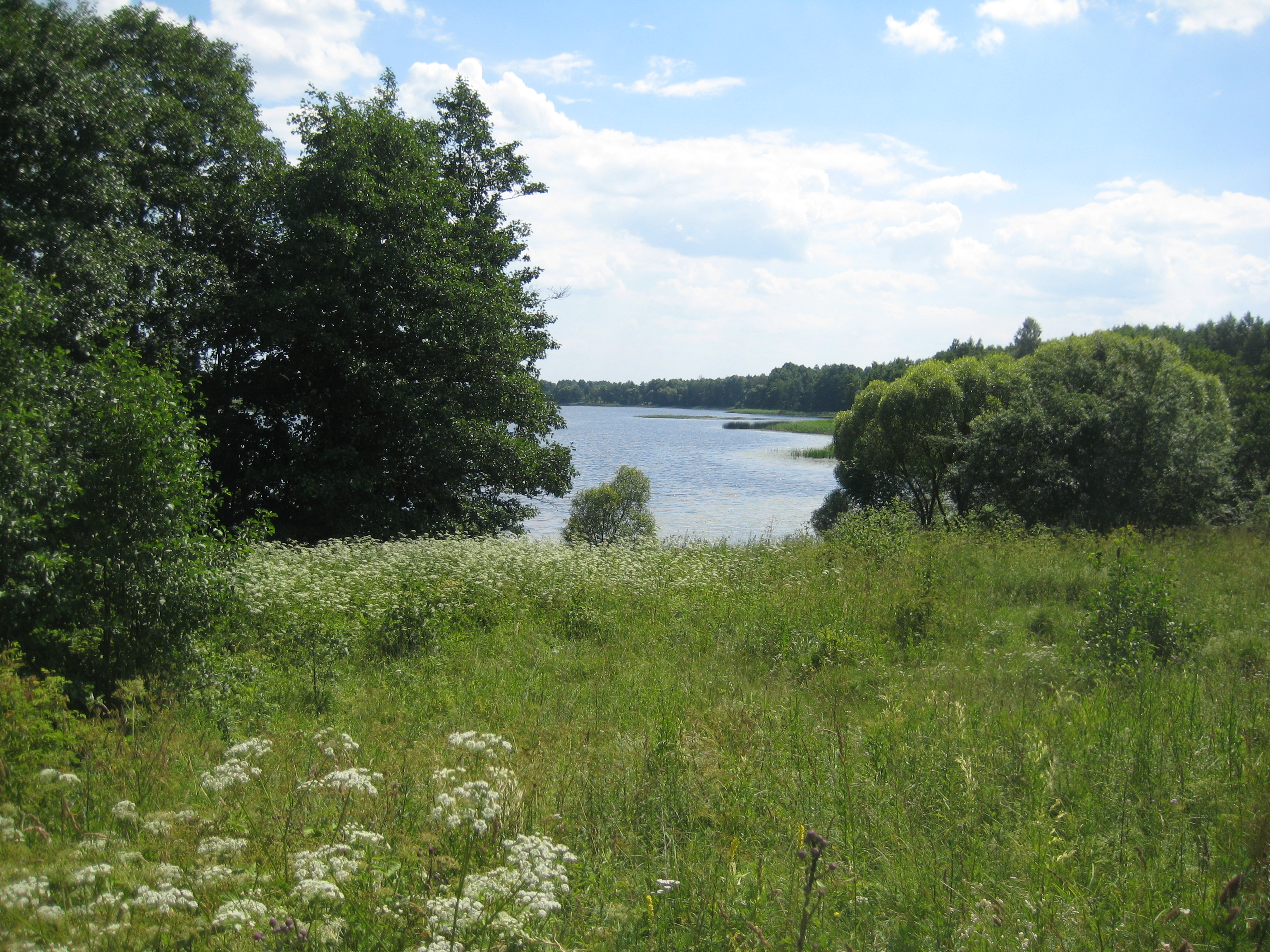 Andriejauka, Lithuania